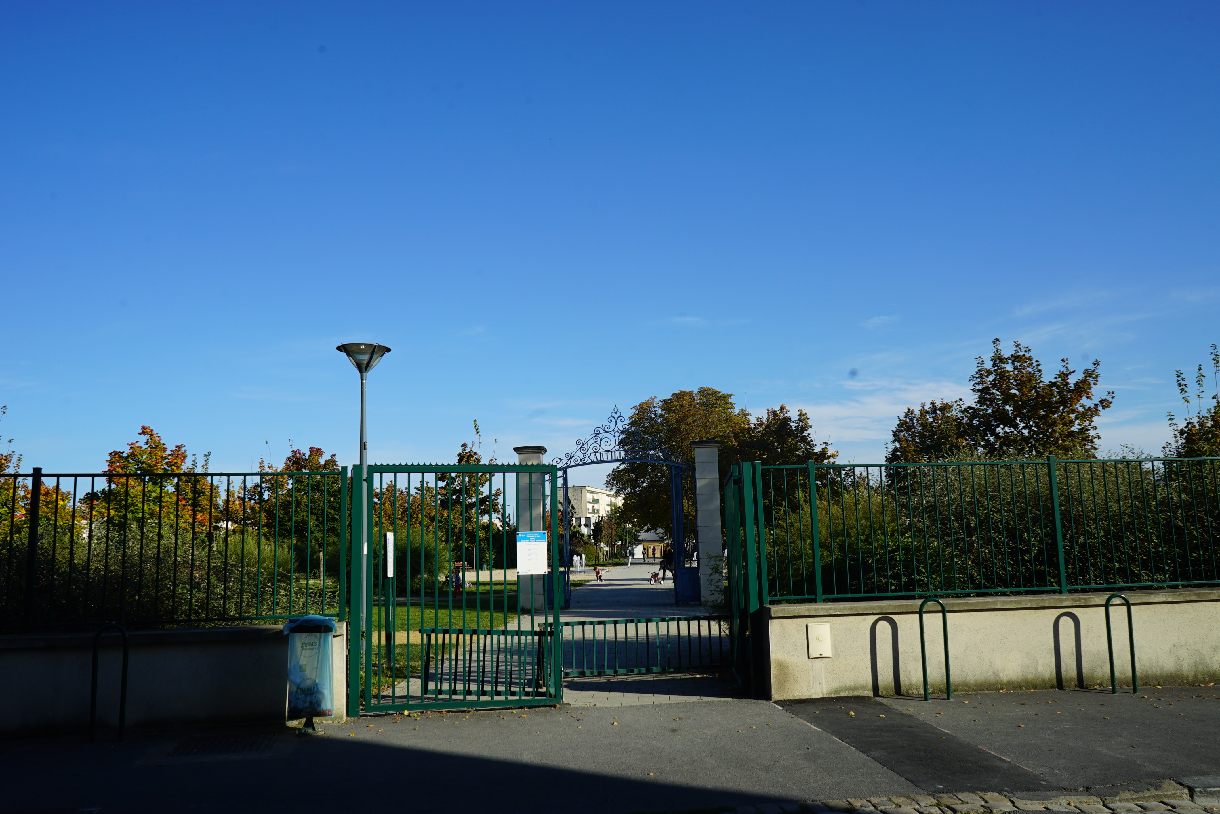 vue du parc Pozzo-di-Borgo.